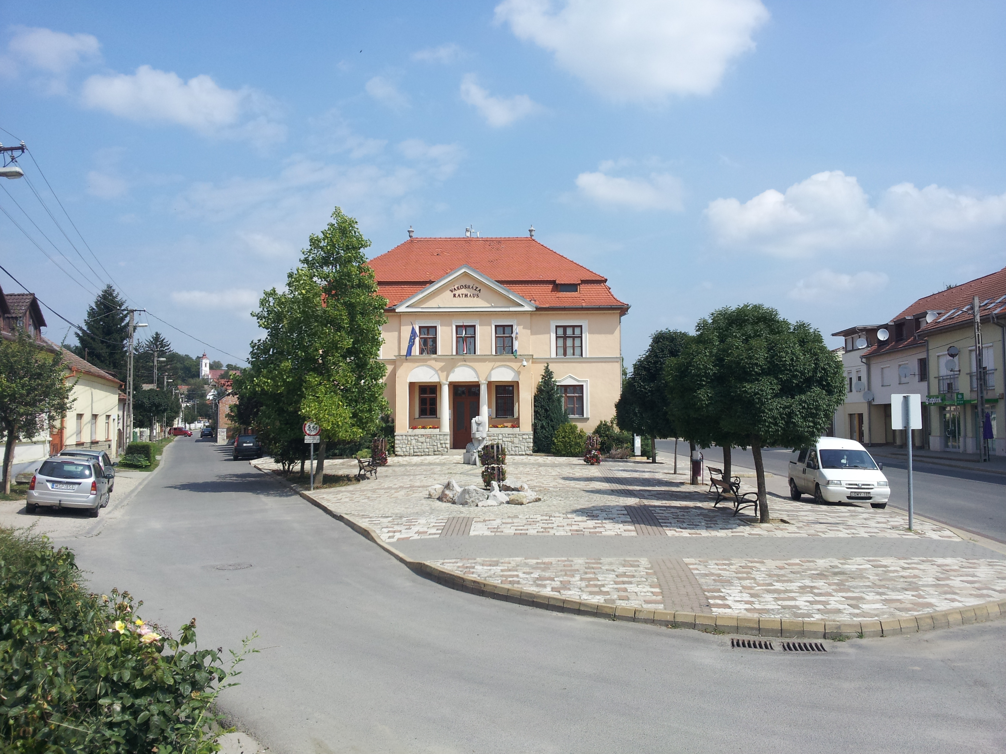 Villány Rathaus